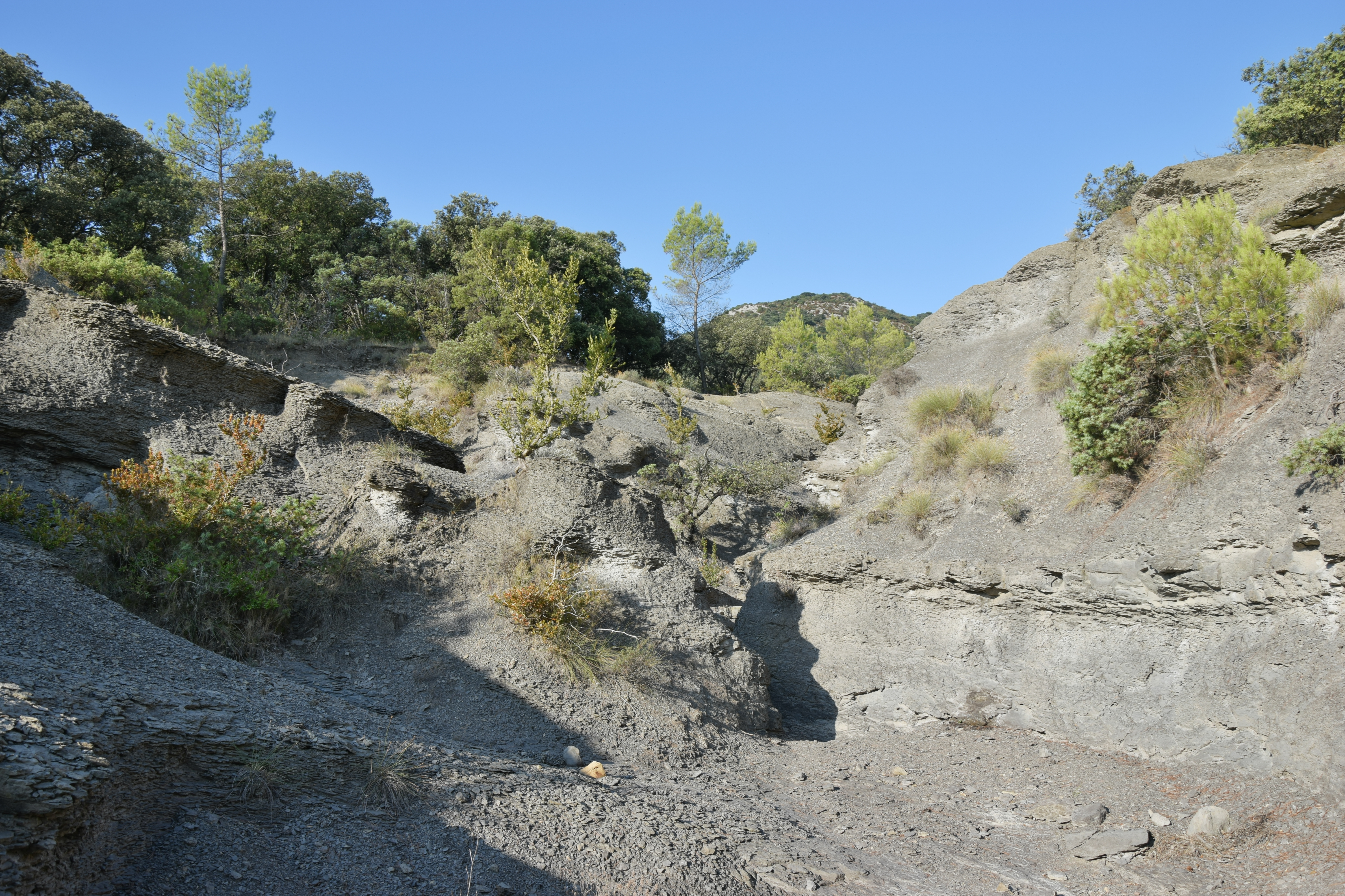 Marnes du Callovien, localement nommées les « terres grises », sur le territoire de la commune de Quissac, dans le Gard (région Occitanie, France).